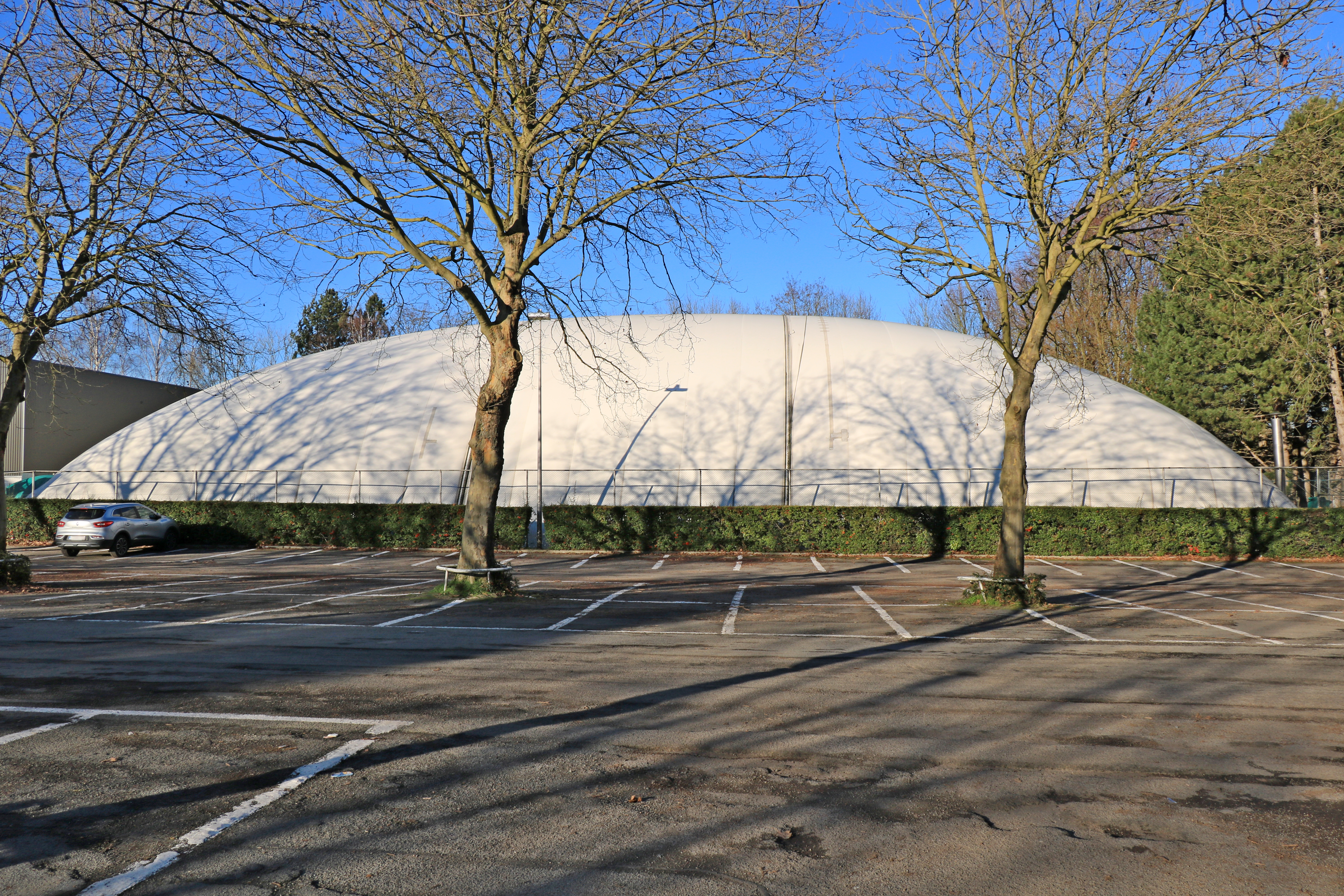 Belgique - Louvain-la-Neuve - Centre sportif de Blocry - Bulle de tennis T5